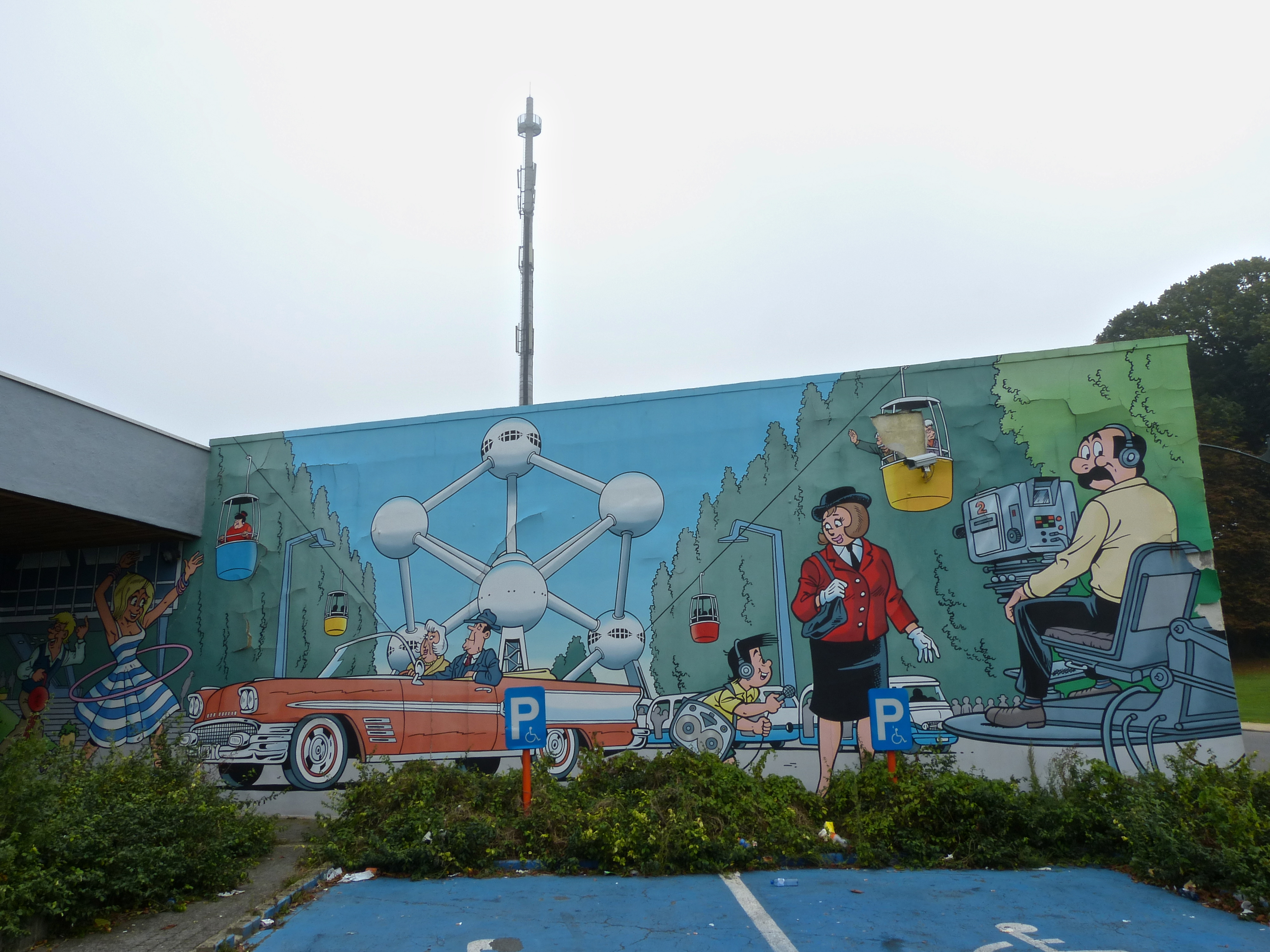 Stripmuur Kiekeboe te Laken (Brussel)